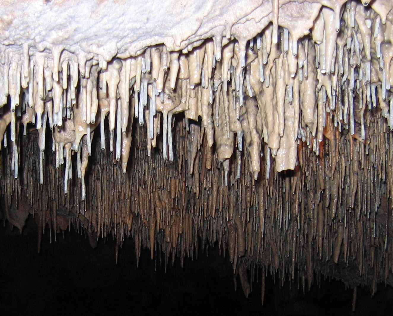 Description: Stalactites (les tubes fins et droits sont appelés des fistuleuses) (Hérault). Hérault, France. Source: Hugo Soria Licence: GFDL Hugo Soria